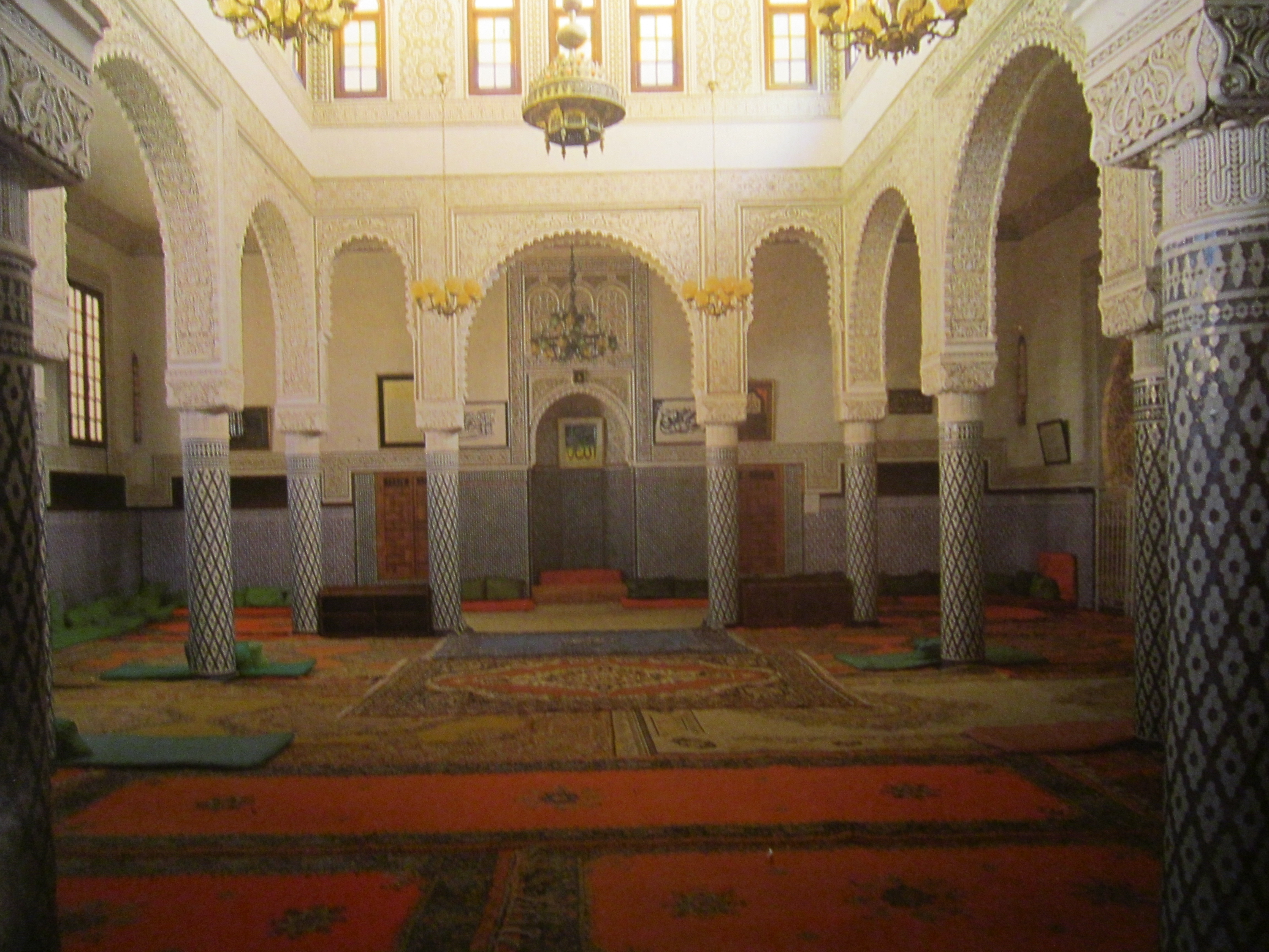 Intérieur Sidi Abdellah Ben Hassoun